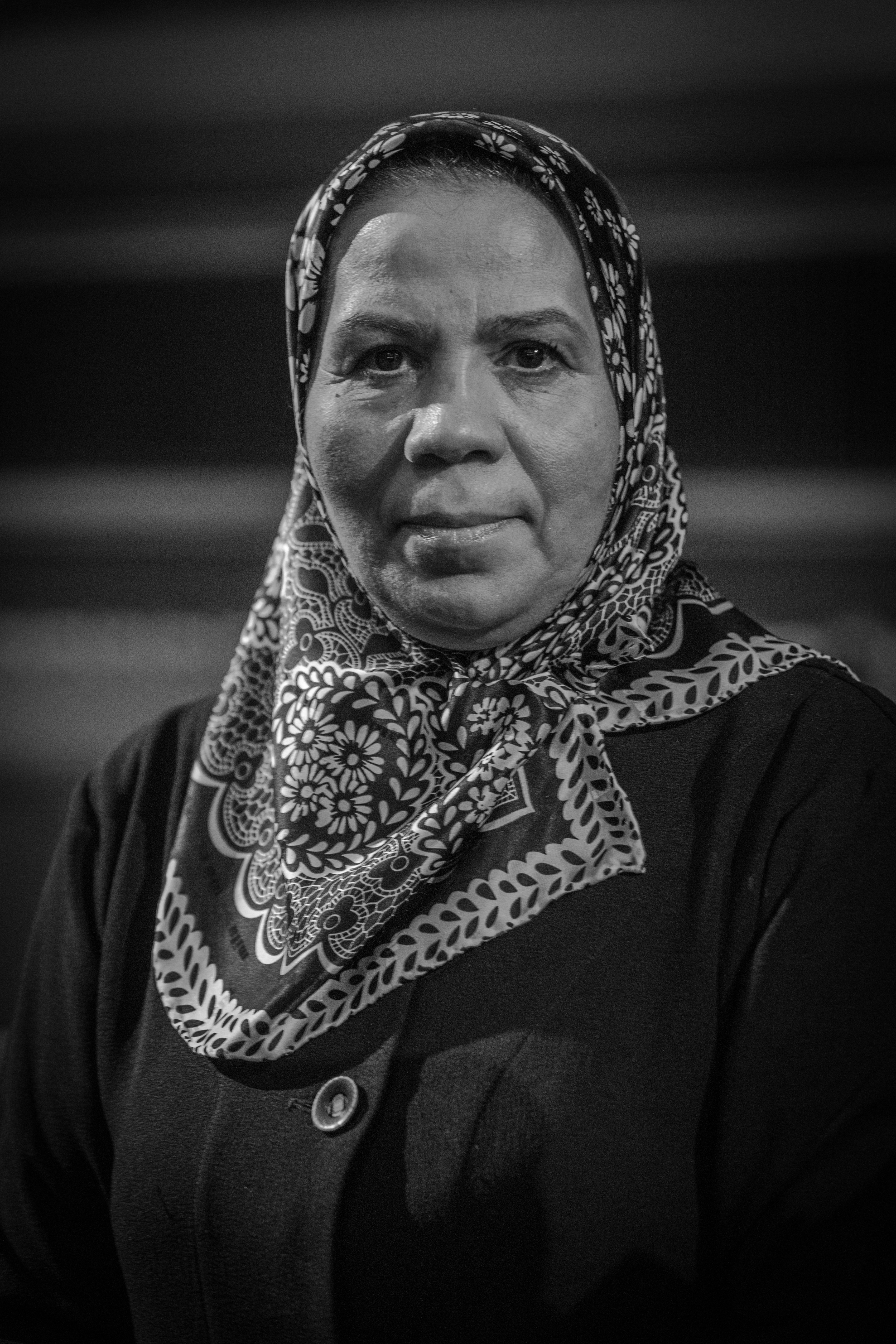 Latifa Ibn Ziaten, née le 1er janvier 1960 à Tétouan (Maroc), est une responsable associative franco-marocaine. Elle est la mère de Imad ibn Ziaten, né en 1981, le premier militaire assassiné à Toulouse par Mohammed Merah le 11 mars 2012.